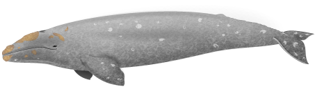 Grauwal (Eschrichtius robustus)